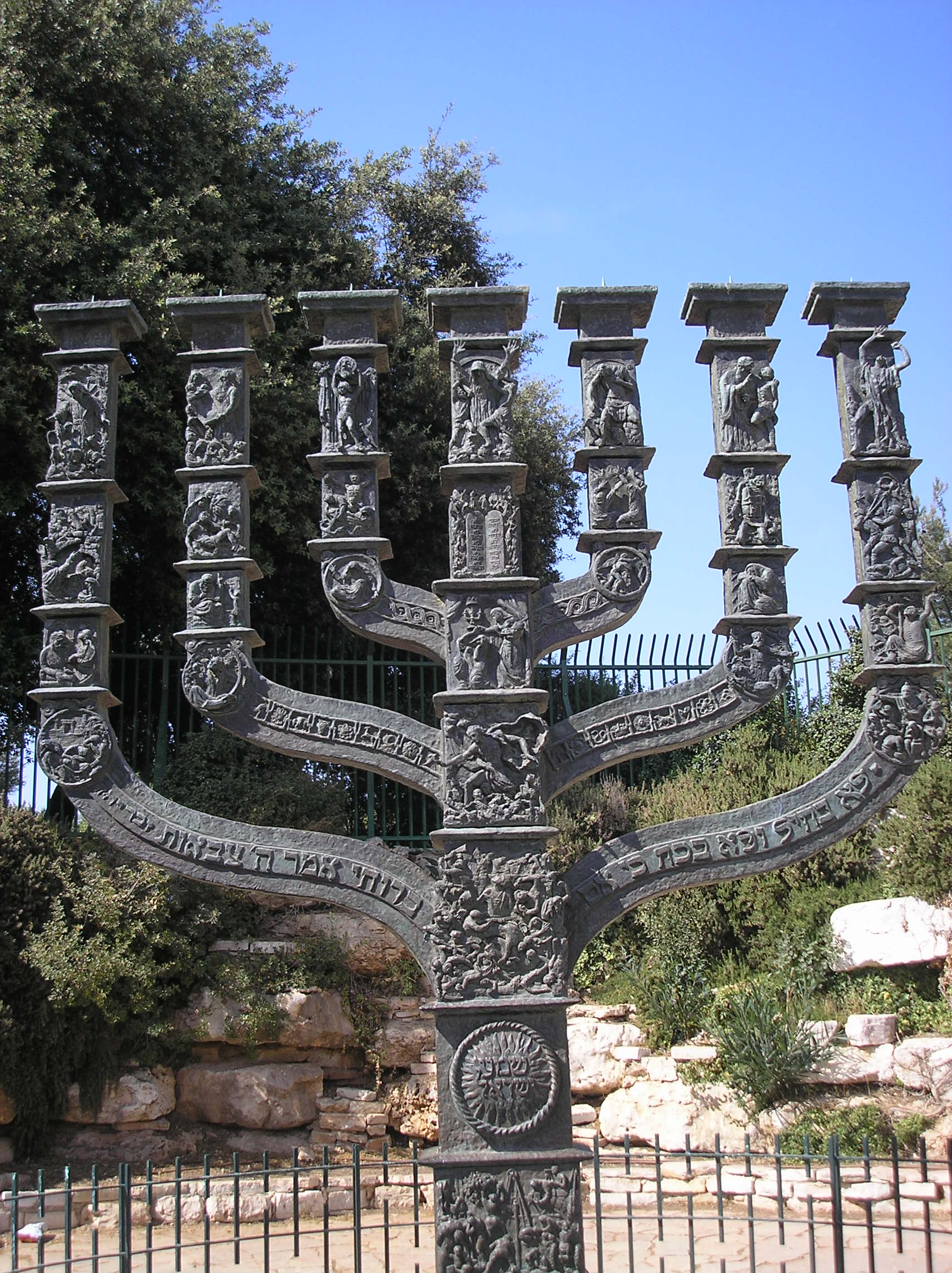 The Knesset Menorah, Jerusalem